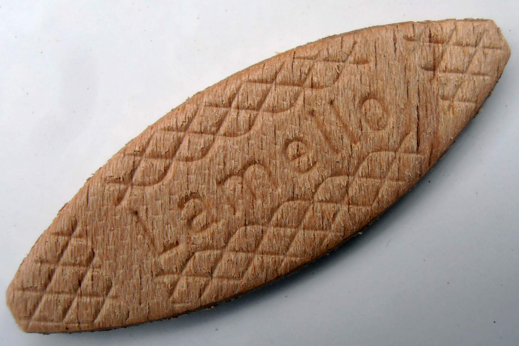 Lamellendübel